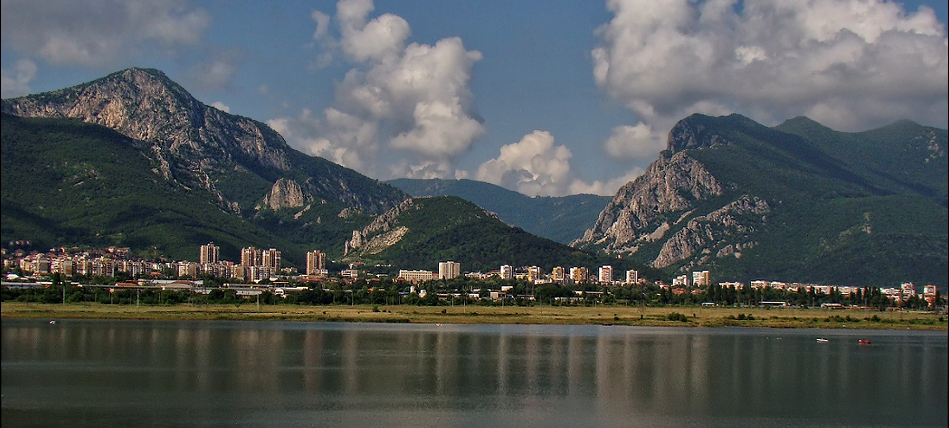 Изглед към Враца